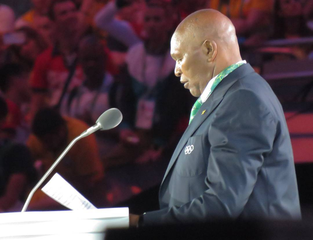 O grande Kip Keino na abertura da #rio2016